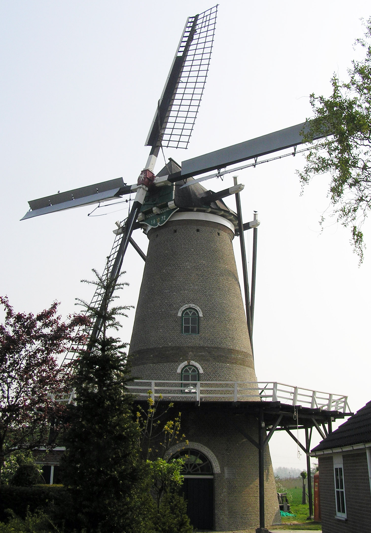 Windmill Nooit Gedacht, Eindewege